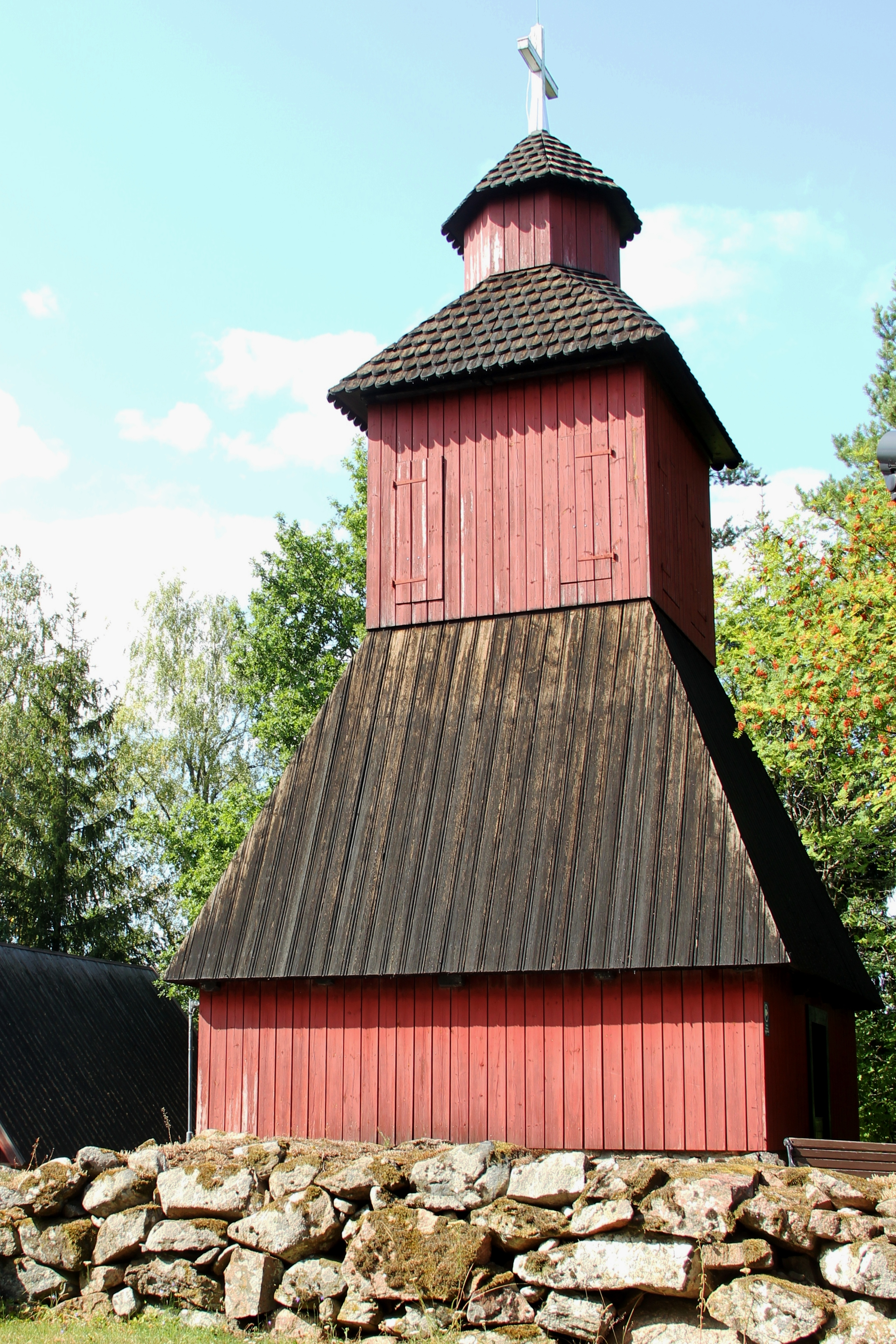 Kellotapuli Linnanrauniontien varrella.